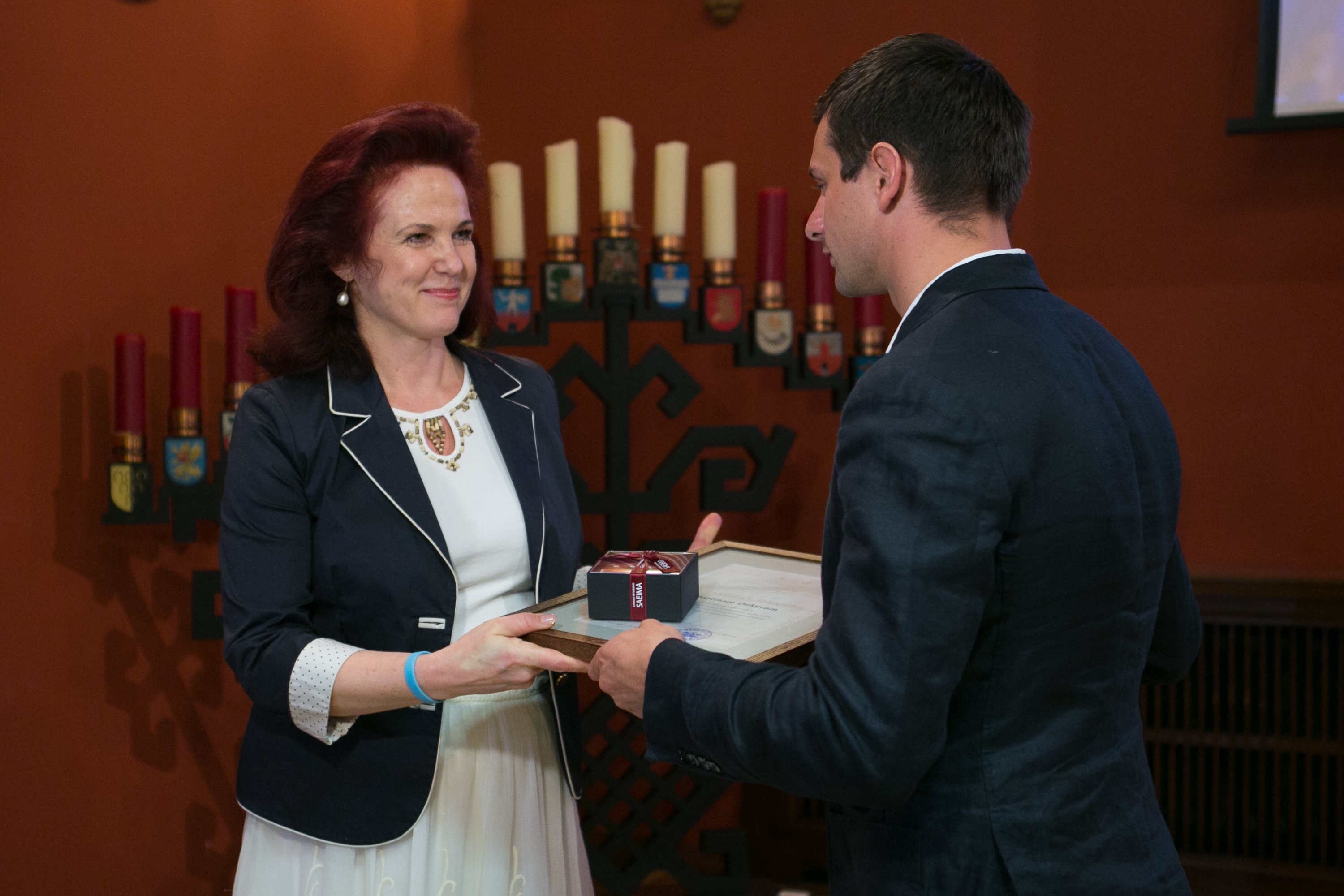 2014.gada 17.maijs. Muzeju nakts ekspozīcija "Varenie dzintara spēki no Latvijas" Saeimas namā. Foto: Ernests Dinka, Saeimas Kanceleja Izmantošanas noteikumi: saeima.lv/lv/autortiesibas